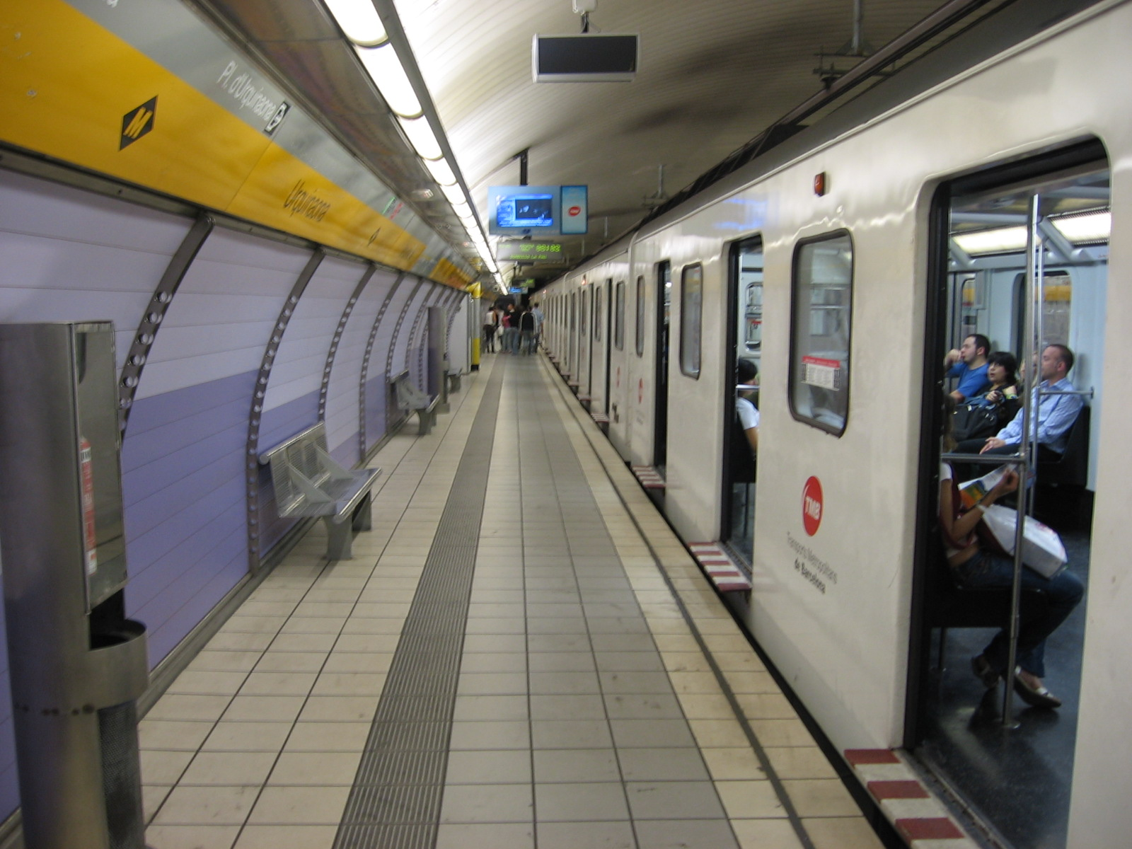 Platform of Urquinaona station, Barcelona Metro/Andana de l'estació Urquinaona del metro de Barcelona